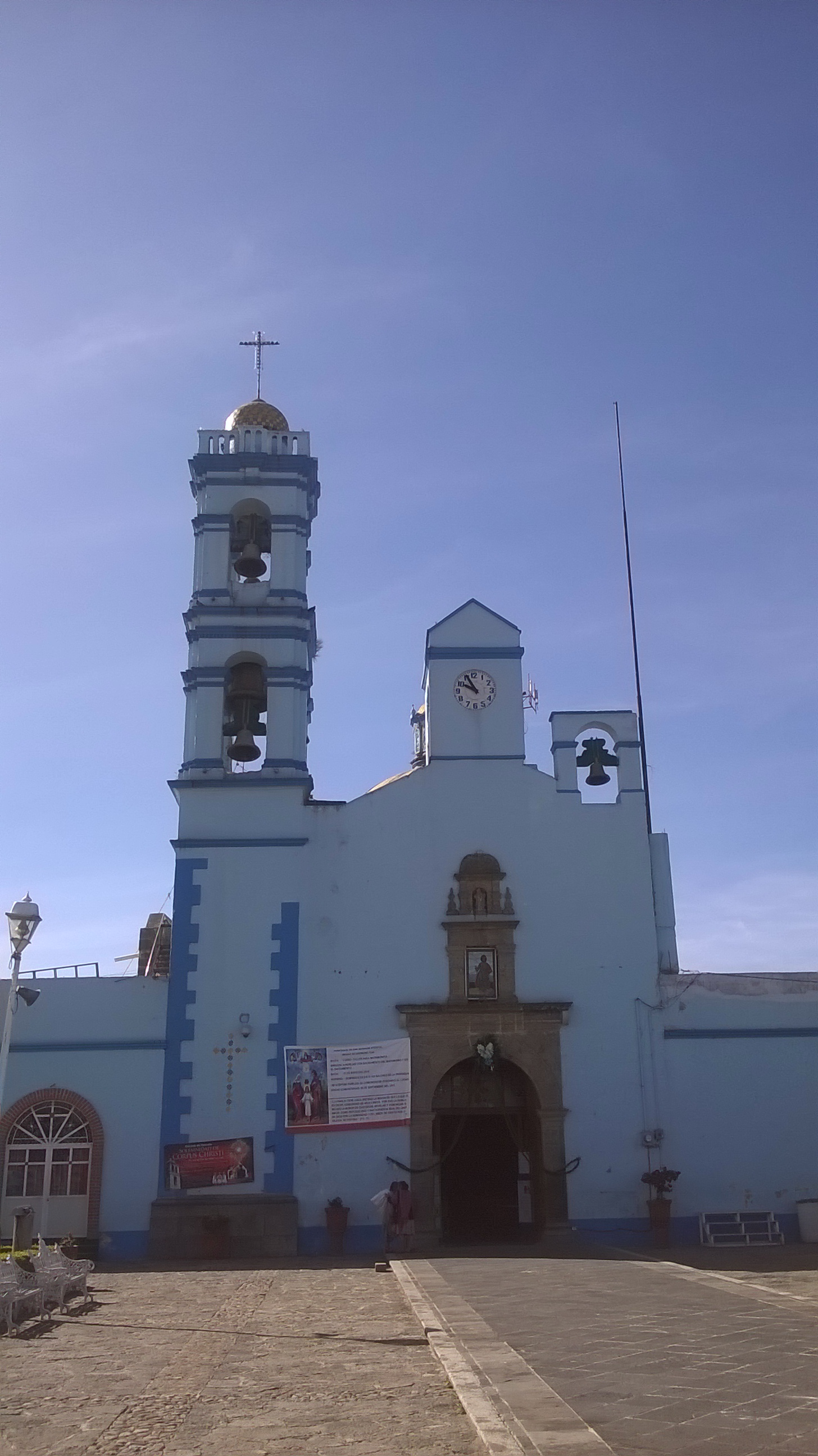 Iglesia de San Bernabé Apóstol. Amaxac de Guerrero, Tlaxcala